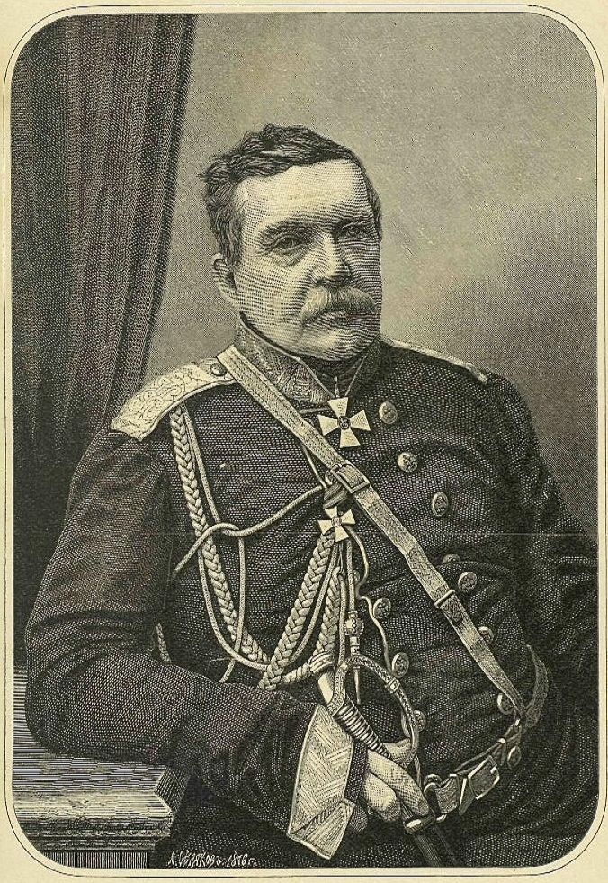 Nikolai Nikolajewitsch Murawjow (Karskiy) (1796-1866)